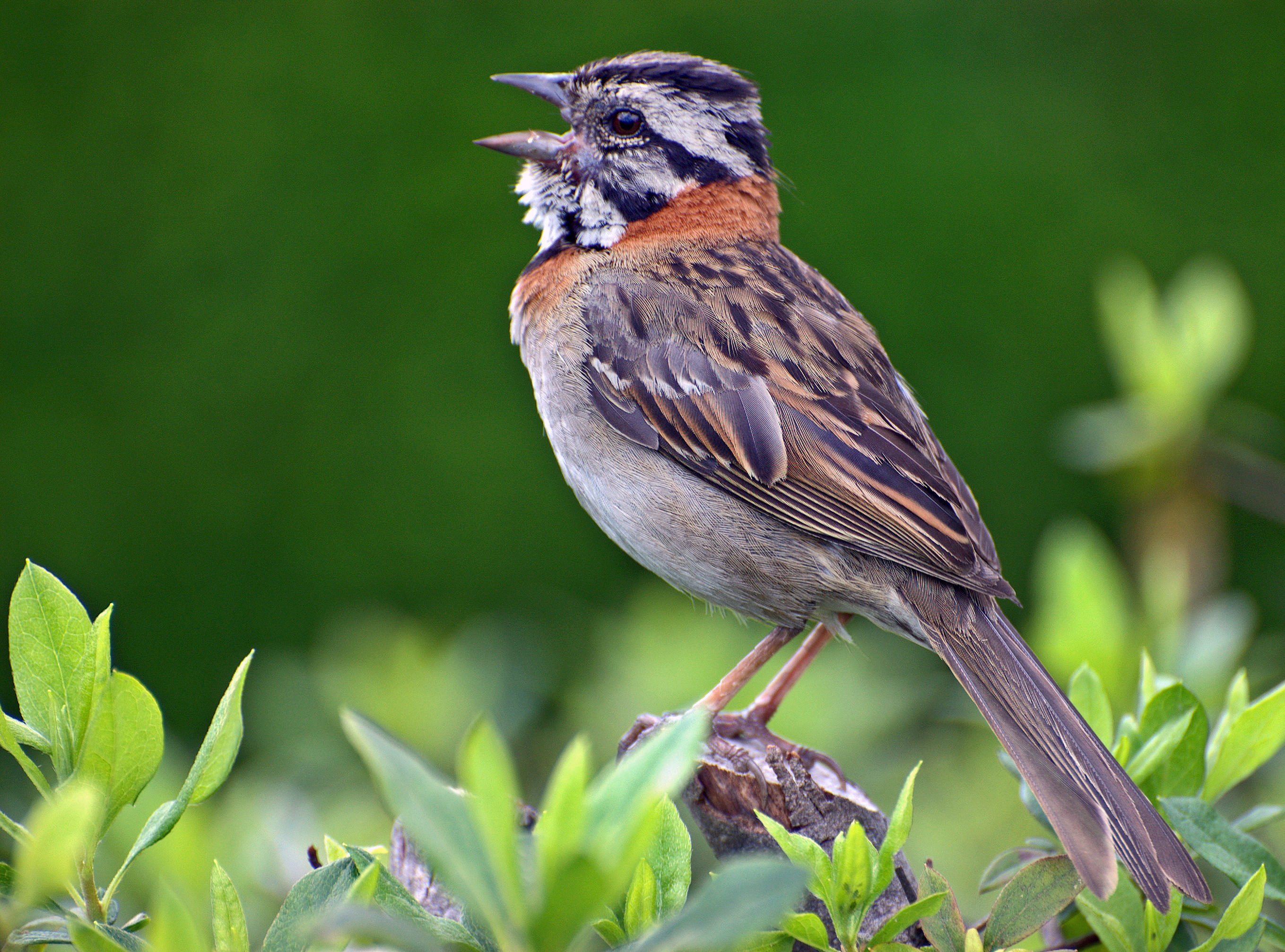 Zonotrichia capensis ; Parque da Independência, Museu do Ipiranga, São Paulo